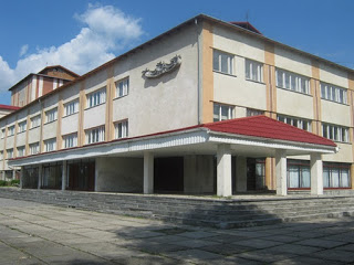 Вигляд Золочівської центральної бібліотеки ззовні